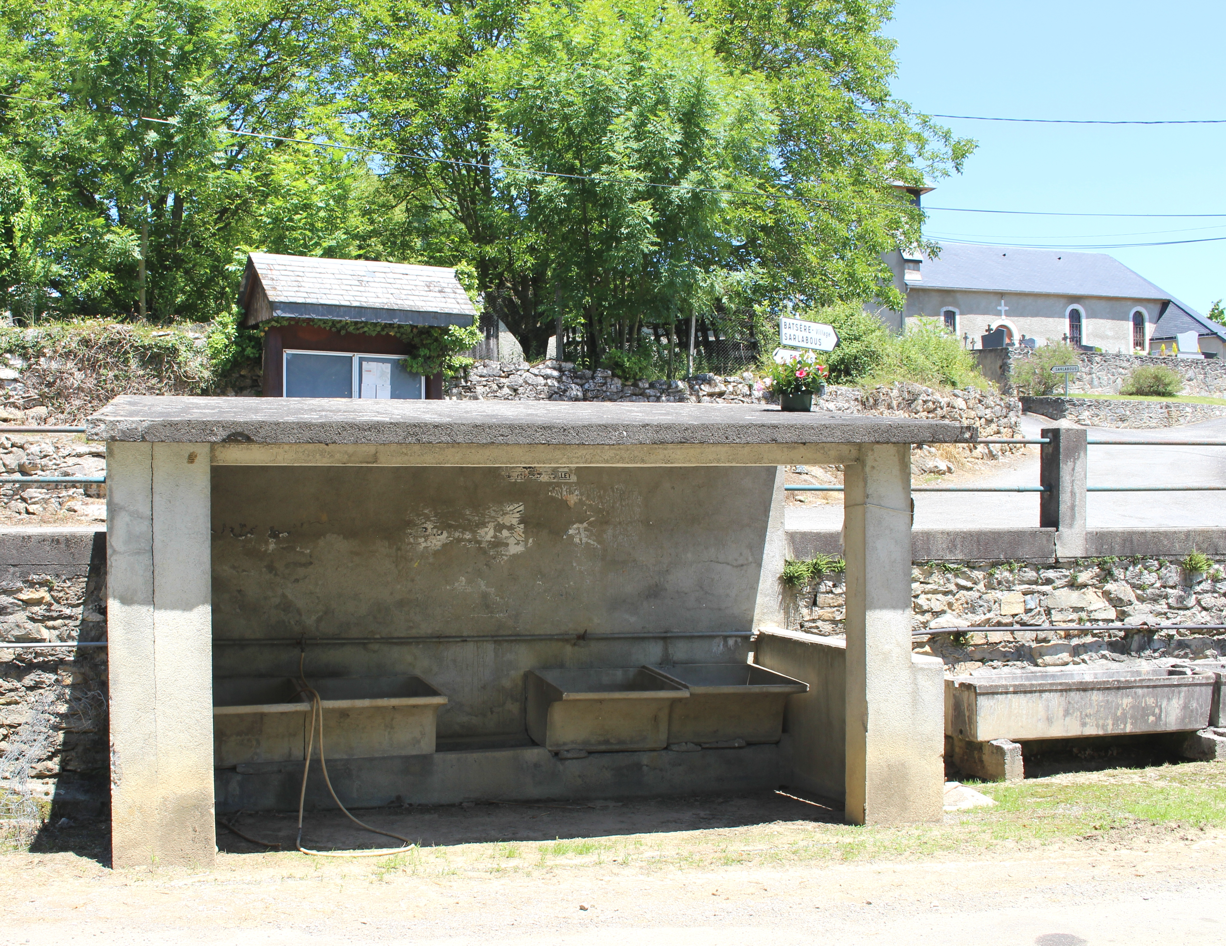 Lavoir de Batsère (Hautes-Pyrénées)